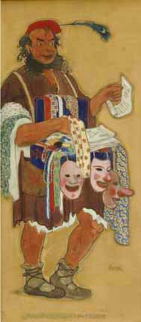 Rollenportrait Rudolph Schildkraut (1862–1930) als "Autolycus" in "Ein Wintermärchen" (Shakespeare), Berlin 1906, Öl auf Leinwand, 197 x 88 cm Theaterwissenschaftliche Sammlung der Universität zu Köln, Schloss Wahn , Inv.Nr. 41206